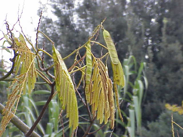 Species: Albizia julibrissin Family: Mimosaceae Image No. 1